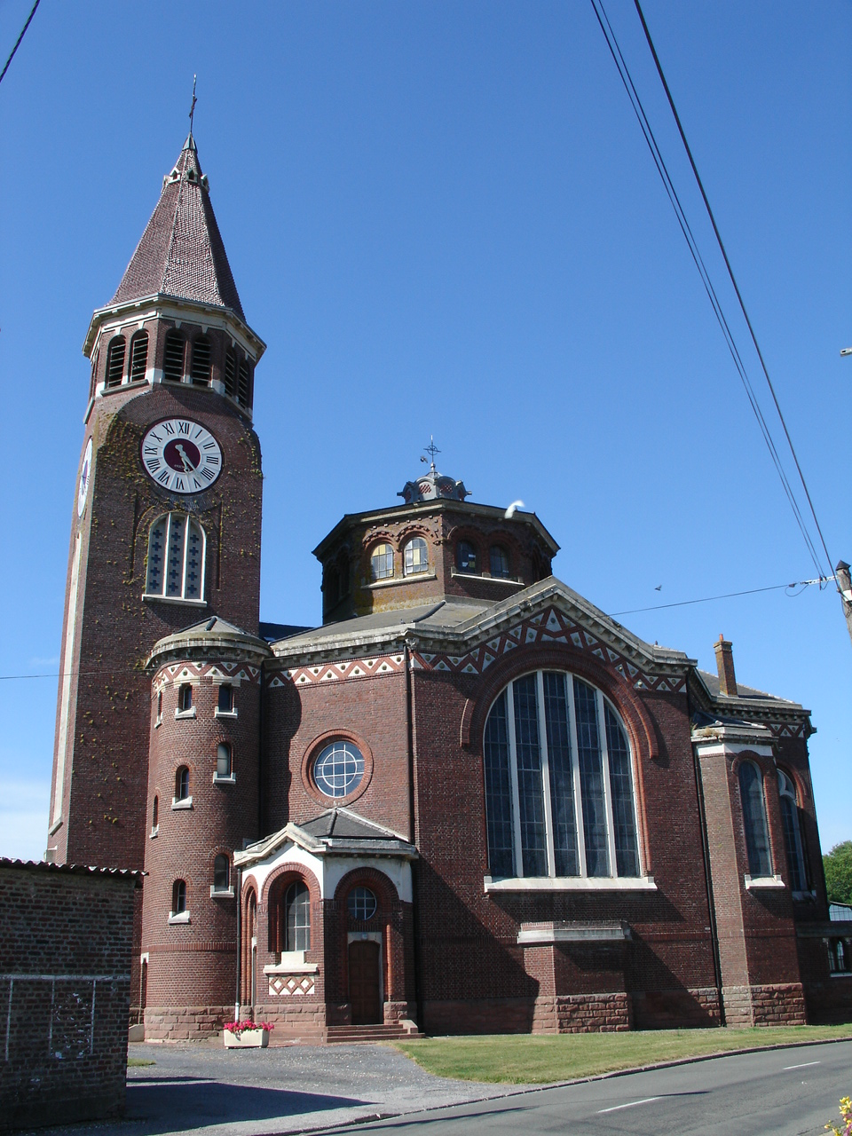 Église d'Hébuterne